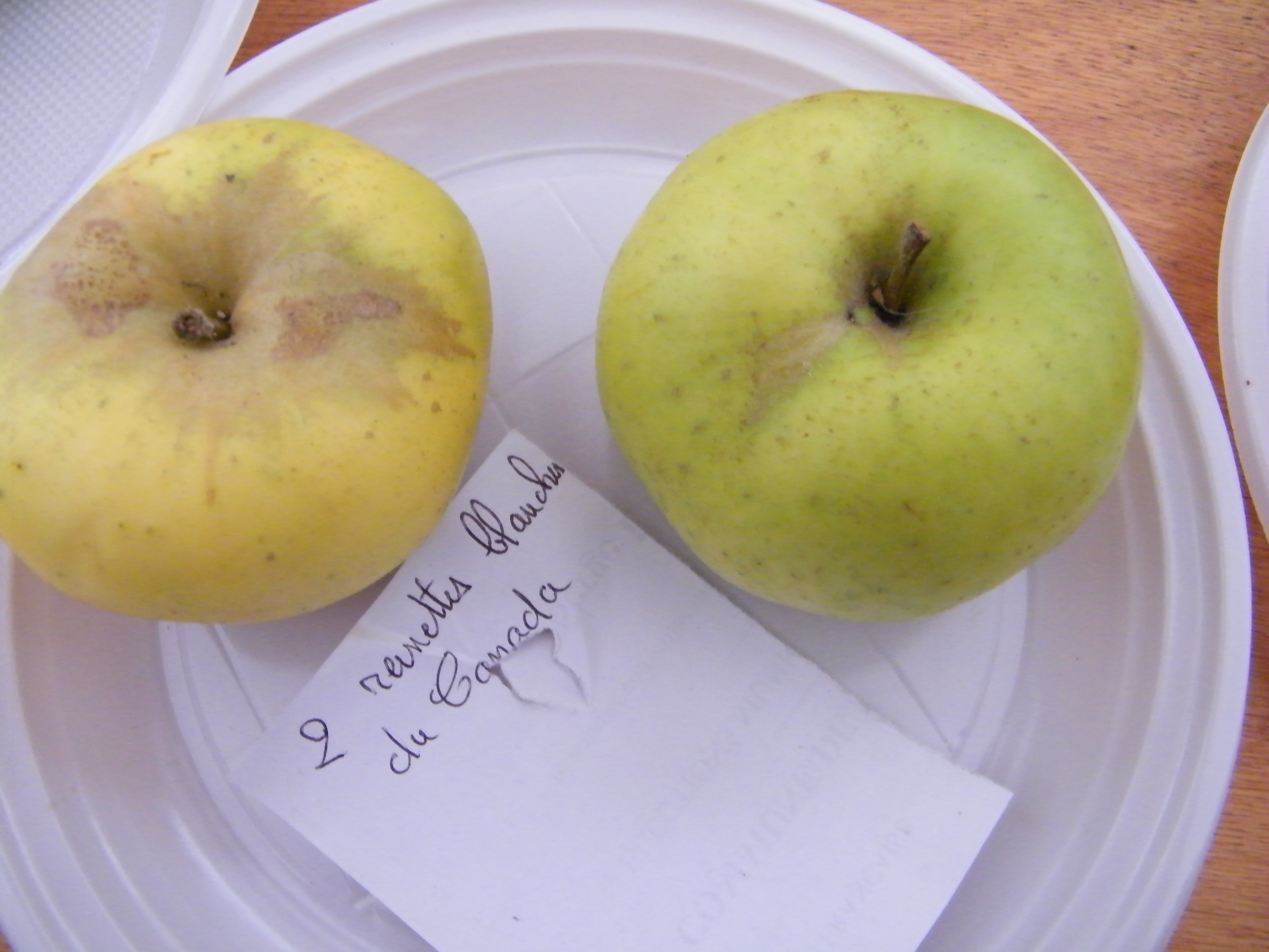 Reinette Blanche du Canada, Mons-Boubert, Somme, Fr, expo du 29-10-2017 (102)